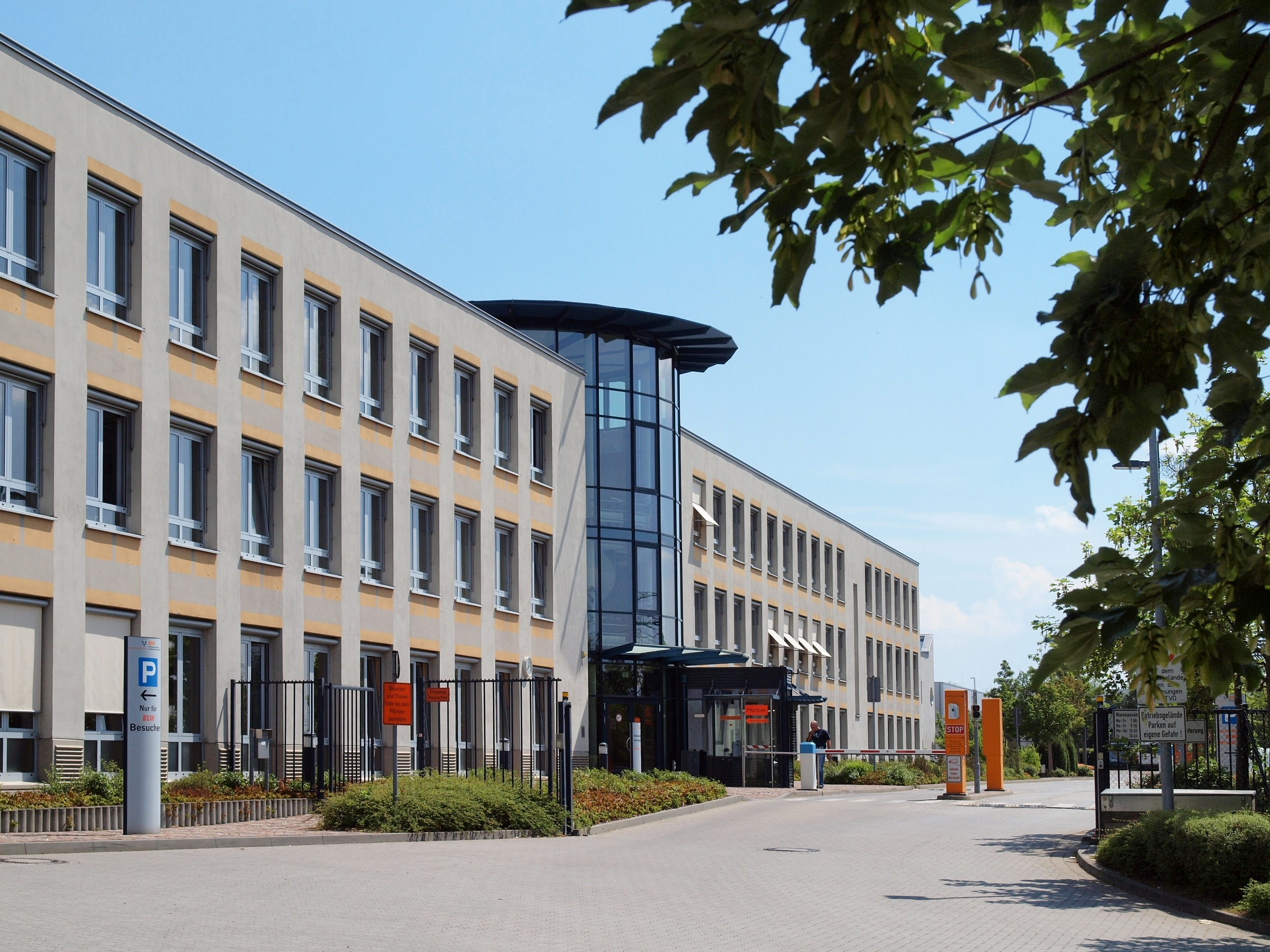 ELW-Betriebshof